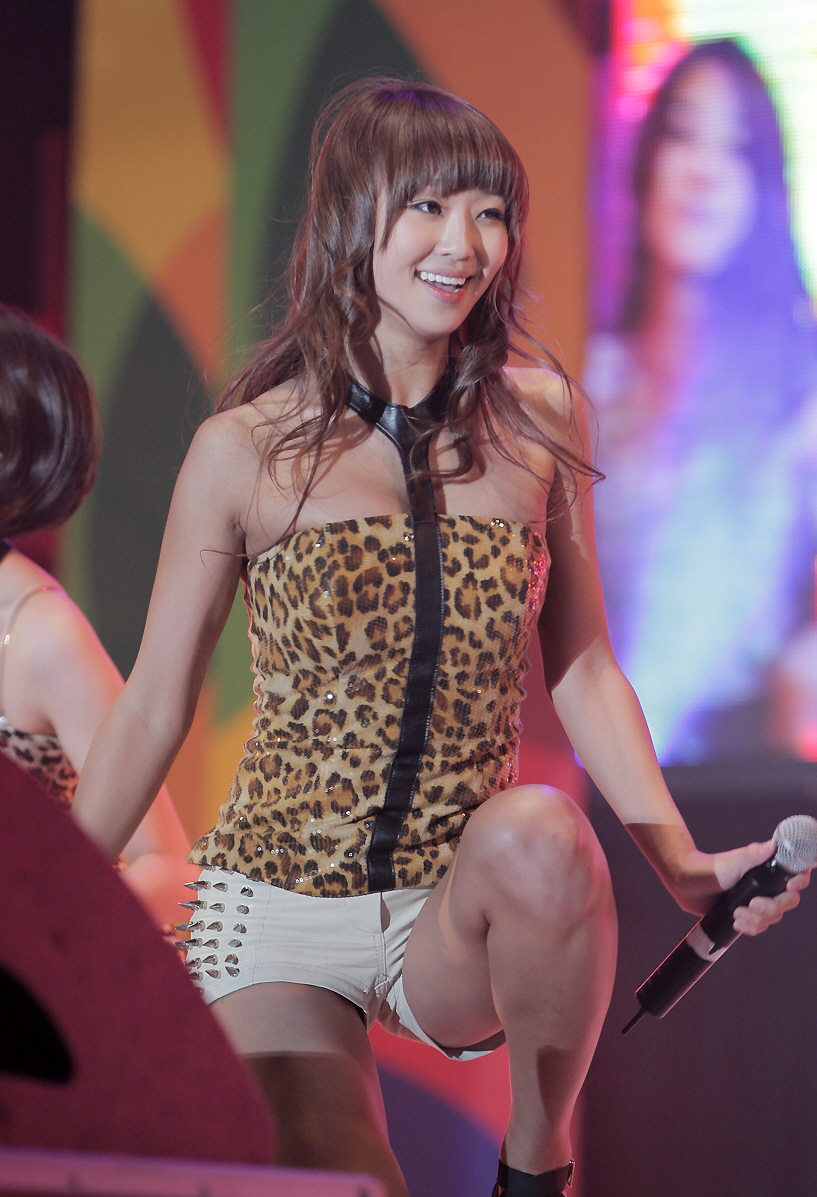 2011. 10. 02. 점프구로 폐막공연 컬투쇼 공개방송 씨스타 _ so cool 1280p